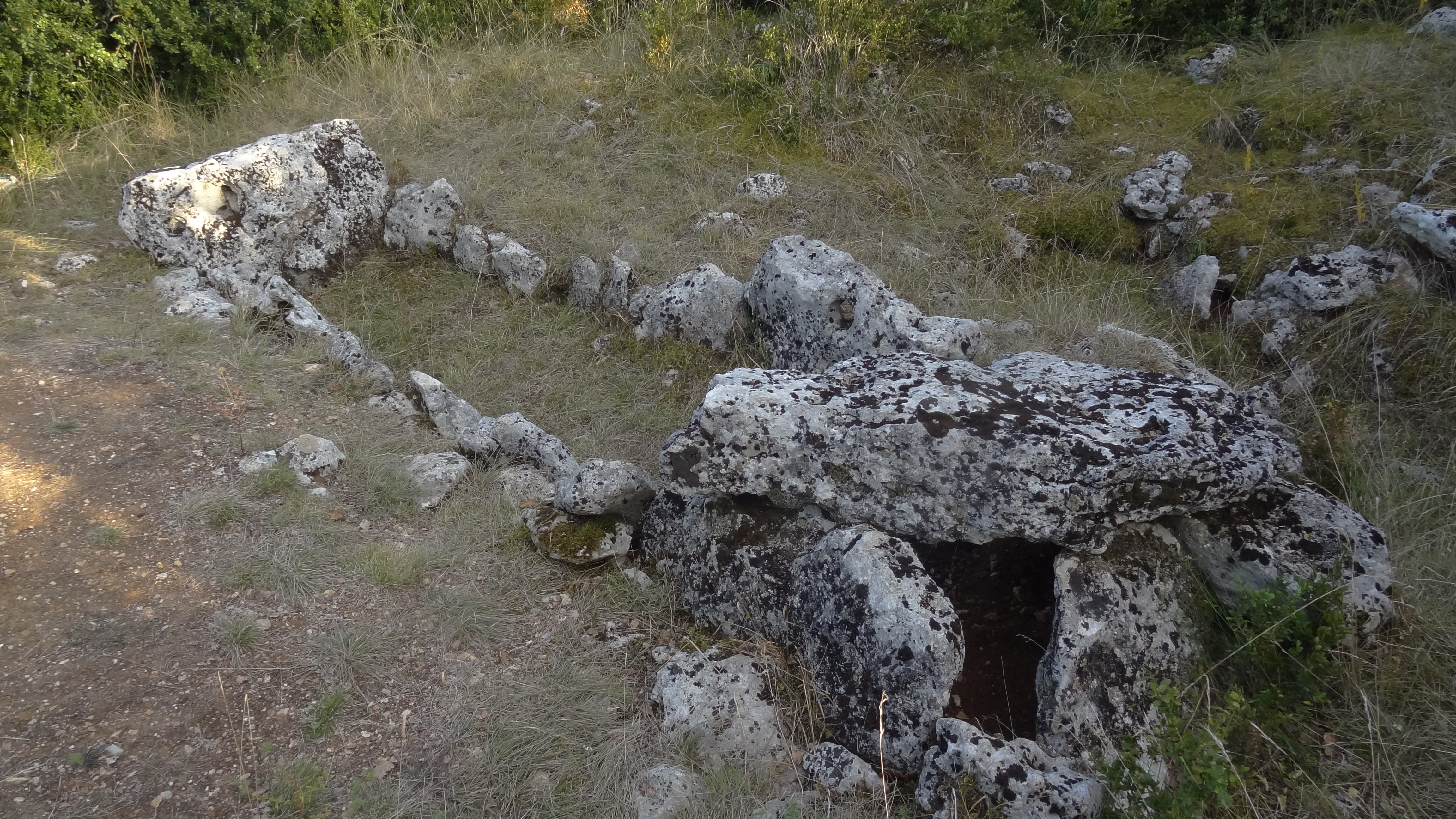 Nécropole préhistorique de la Grande-Mesle (Classé) .